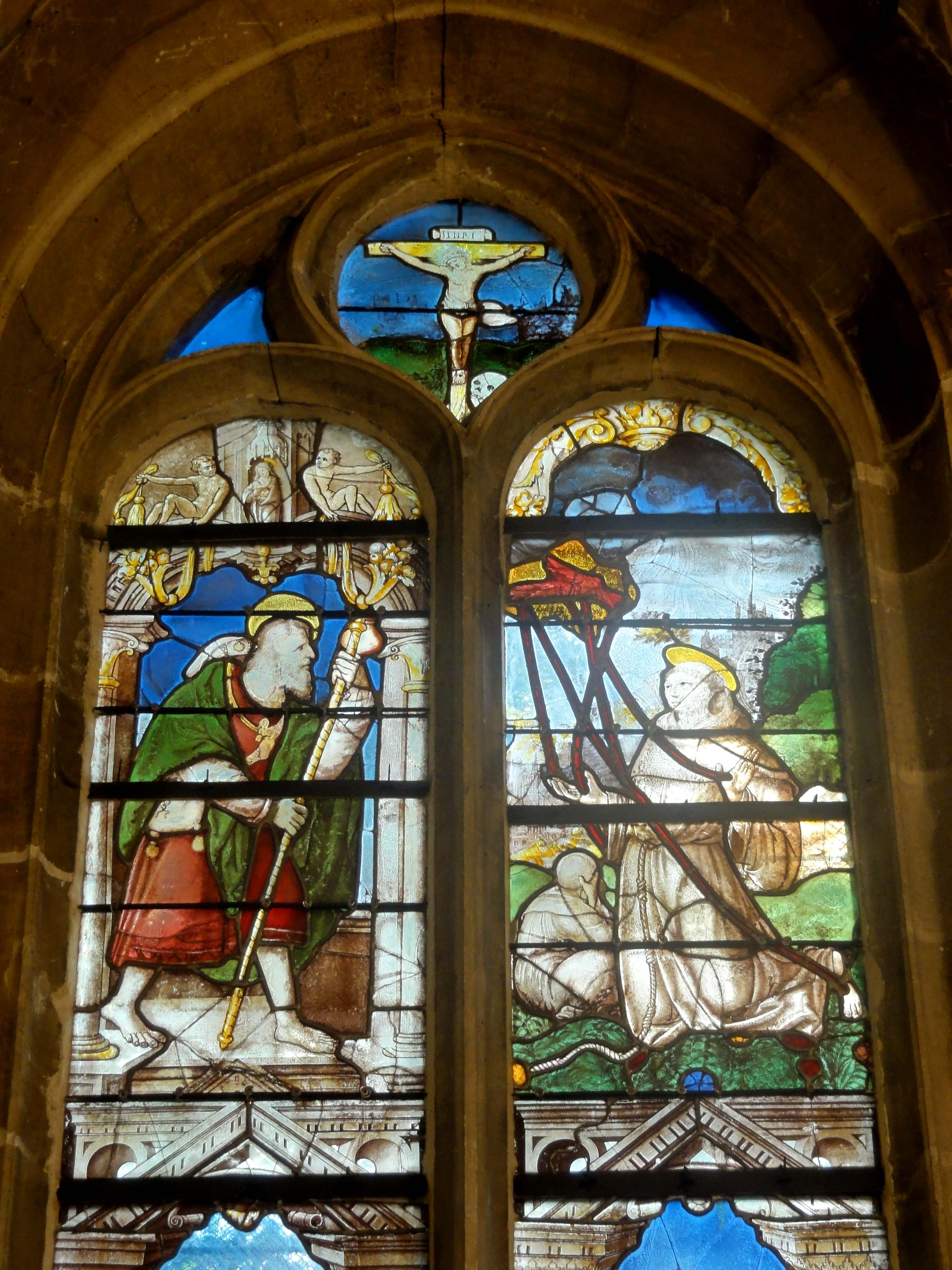 Verrière n° 0 - saint Jacques le Majeur et saint François d'Assise recevant les stigmates.